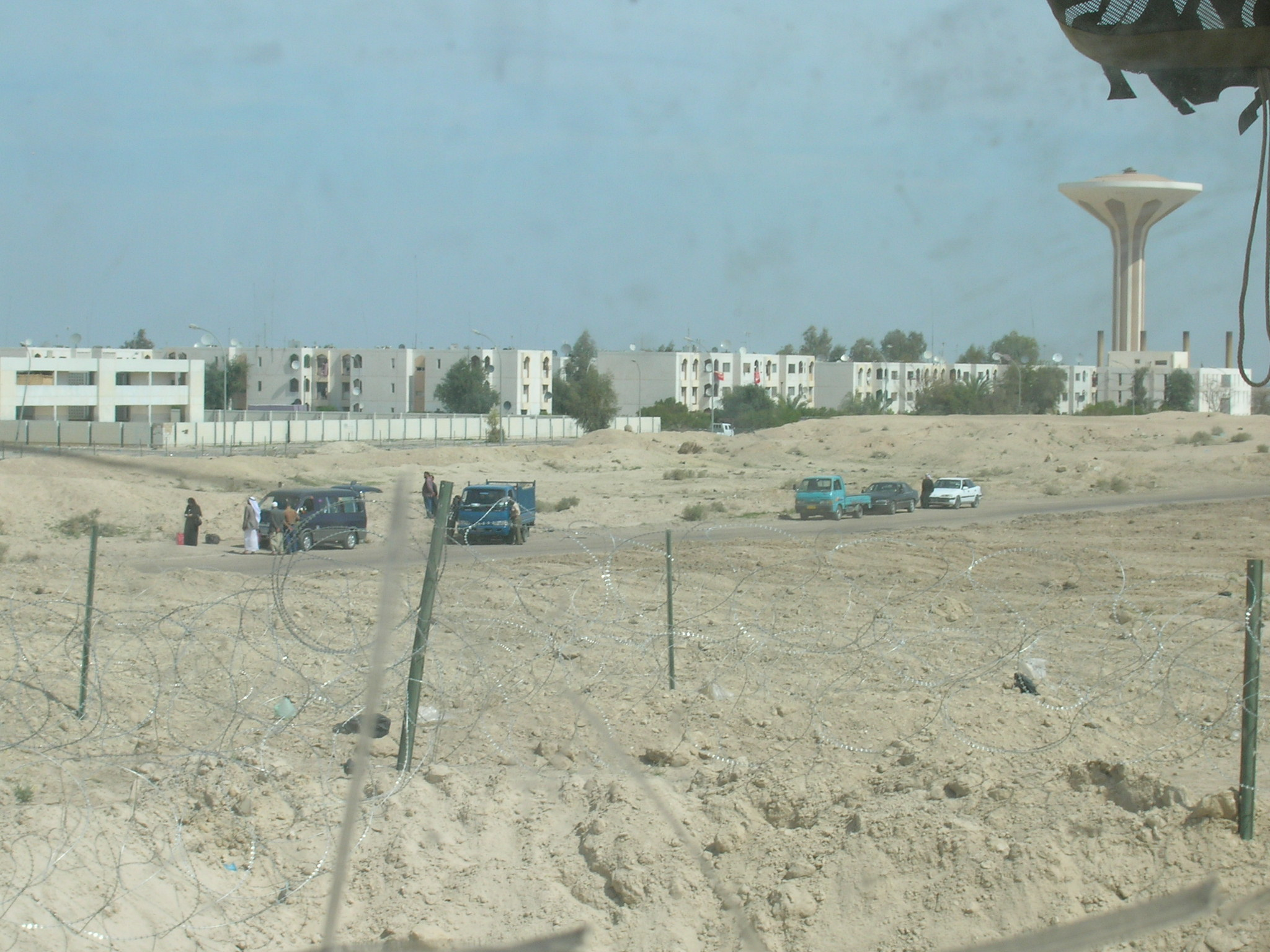 Anbar-Armiaih